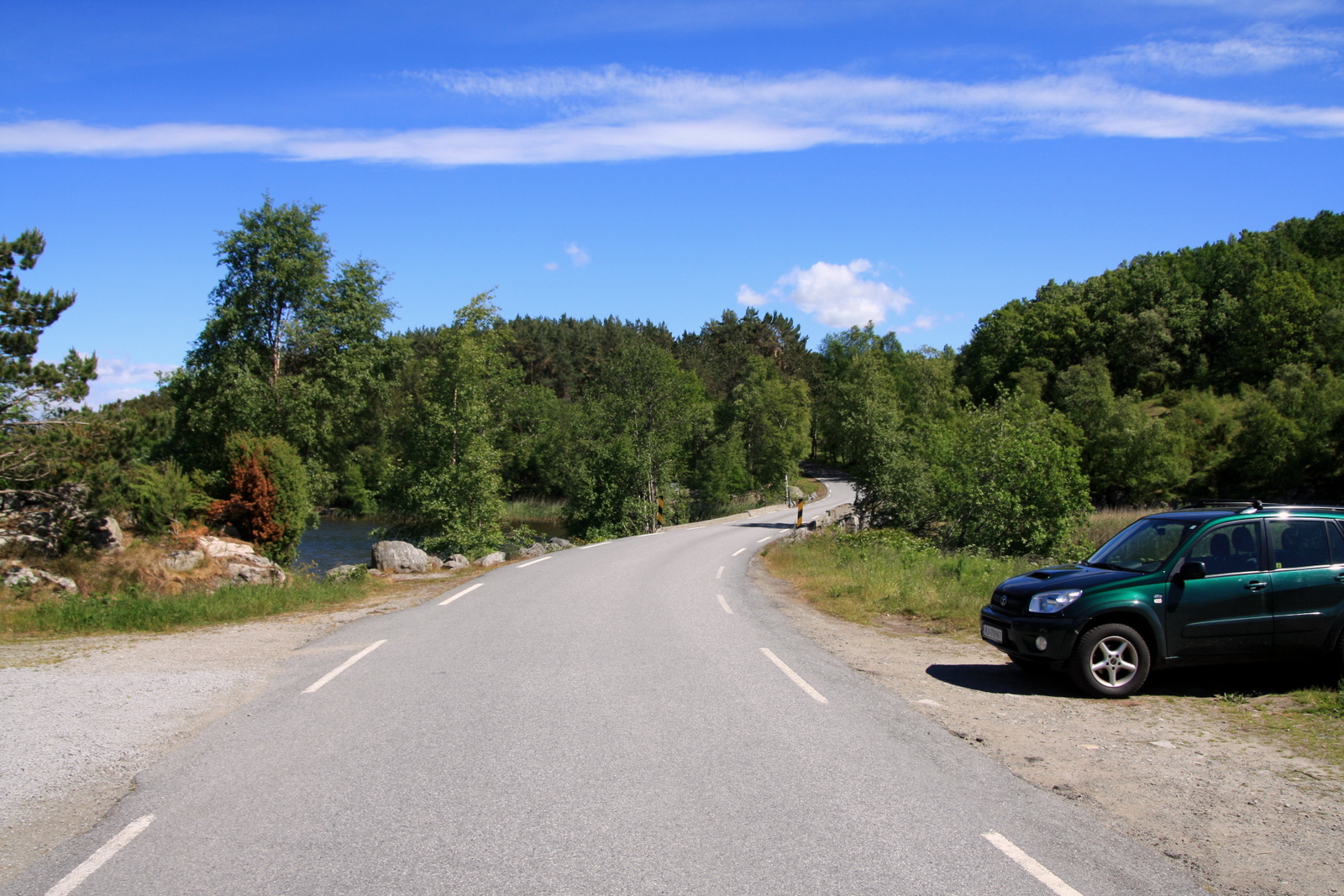 Fylkesvei 337 Furenesveien